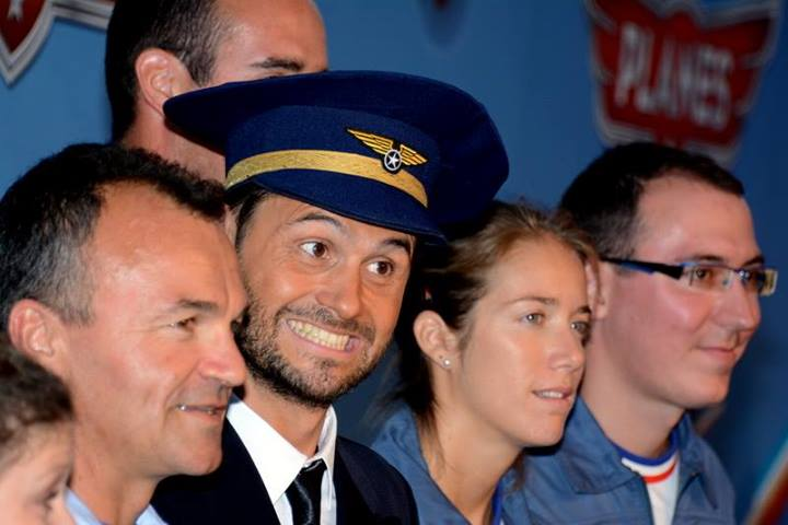 Christophe Beaugrand à l'avant-première parisienne de "Planes", aux côtés de pilotes de la Patrouille de France.